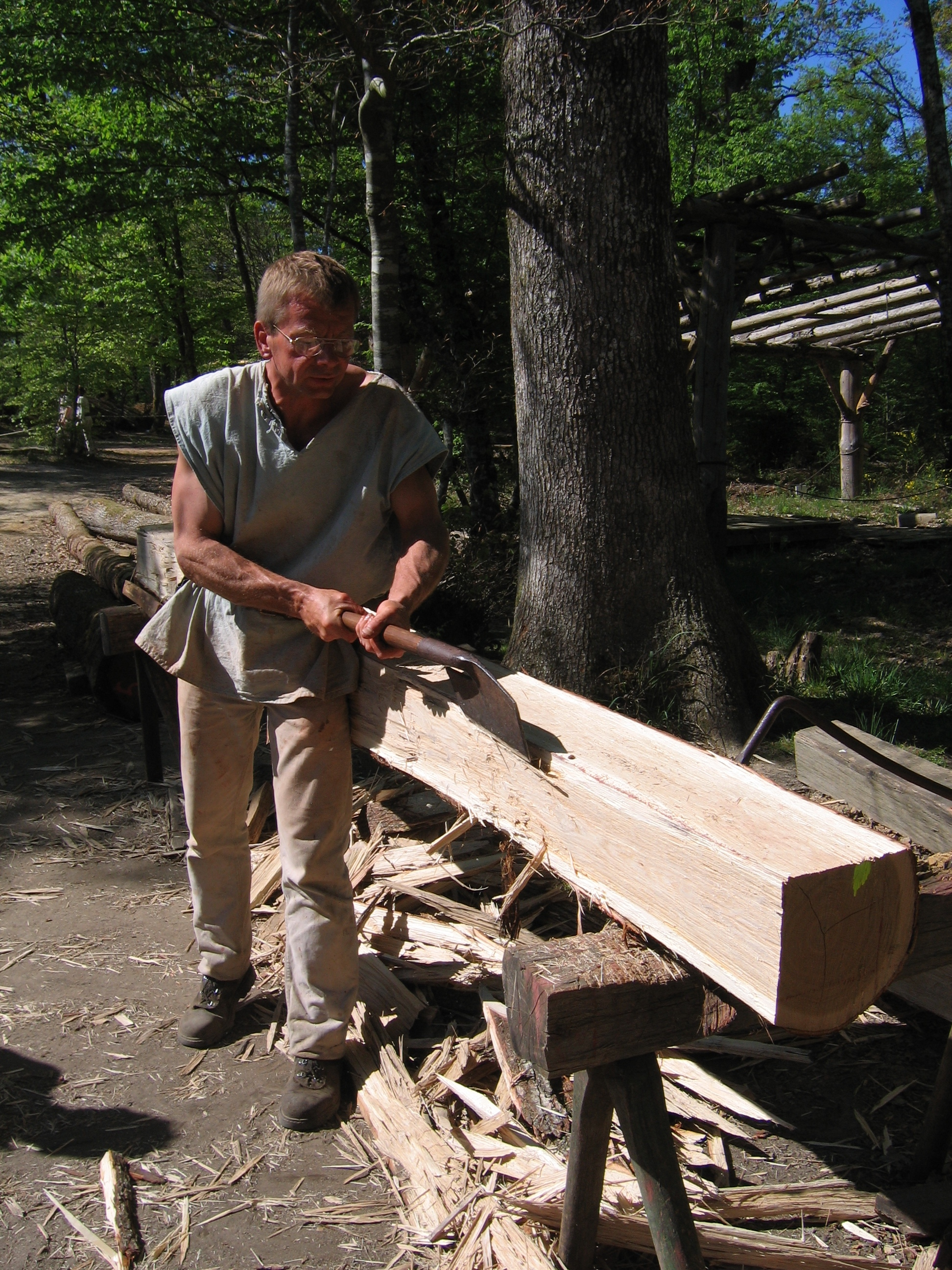 Guedelon, taille des poutres avril 2007, charpentier à l'ouvrage